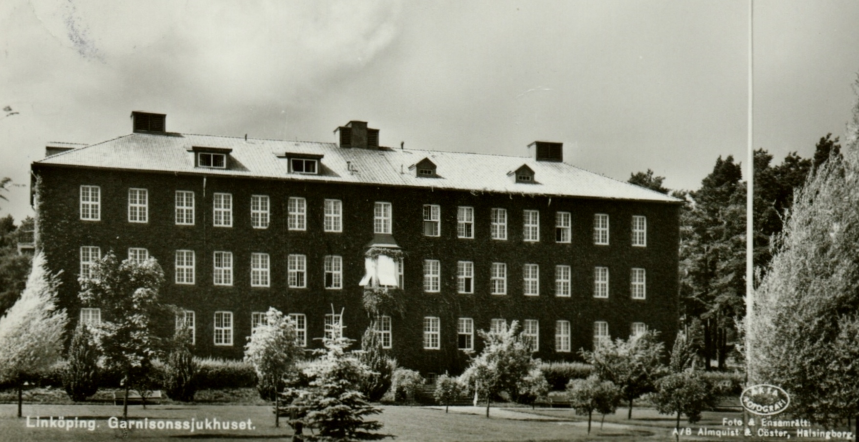 Garnisonssjukhuset i Linköping. Byggnaden uppfördes 1922 för att tjäna de nyligen etablerade regementena i staden, Första- och Andra livgrenadjärregementet. Sjukhuset hade till en början 90 vårdplatser. Över tid kom vårdinrättningen i allt högre grad att nyttjas av Linköpings allmänna lasarett. Byggnaden revs 1993.